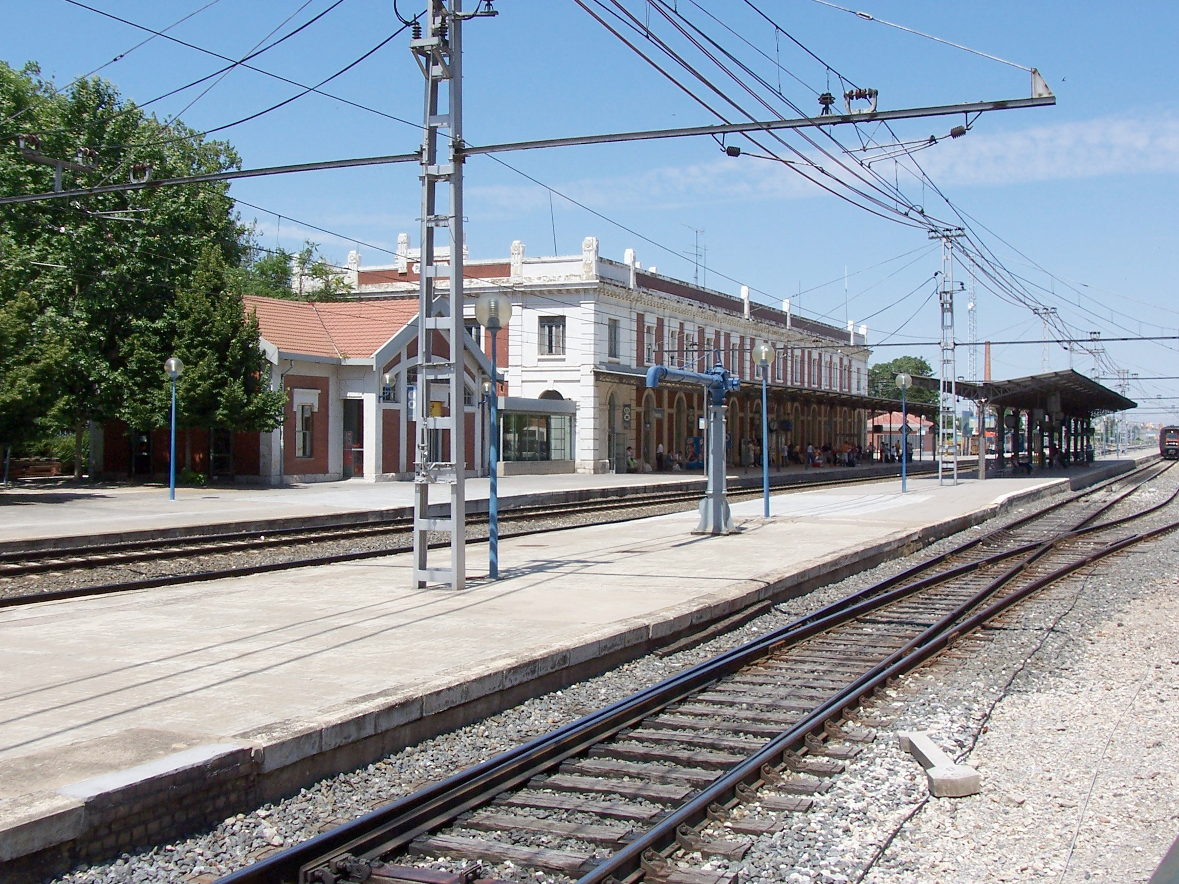 Estacion de trenes en Palencia